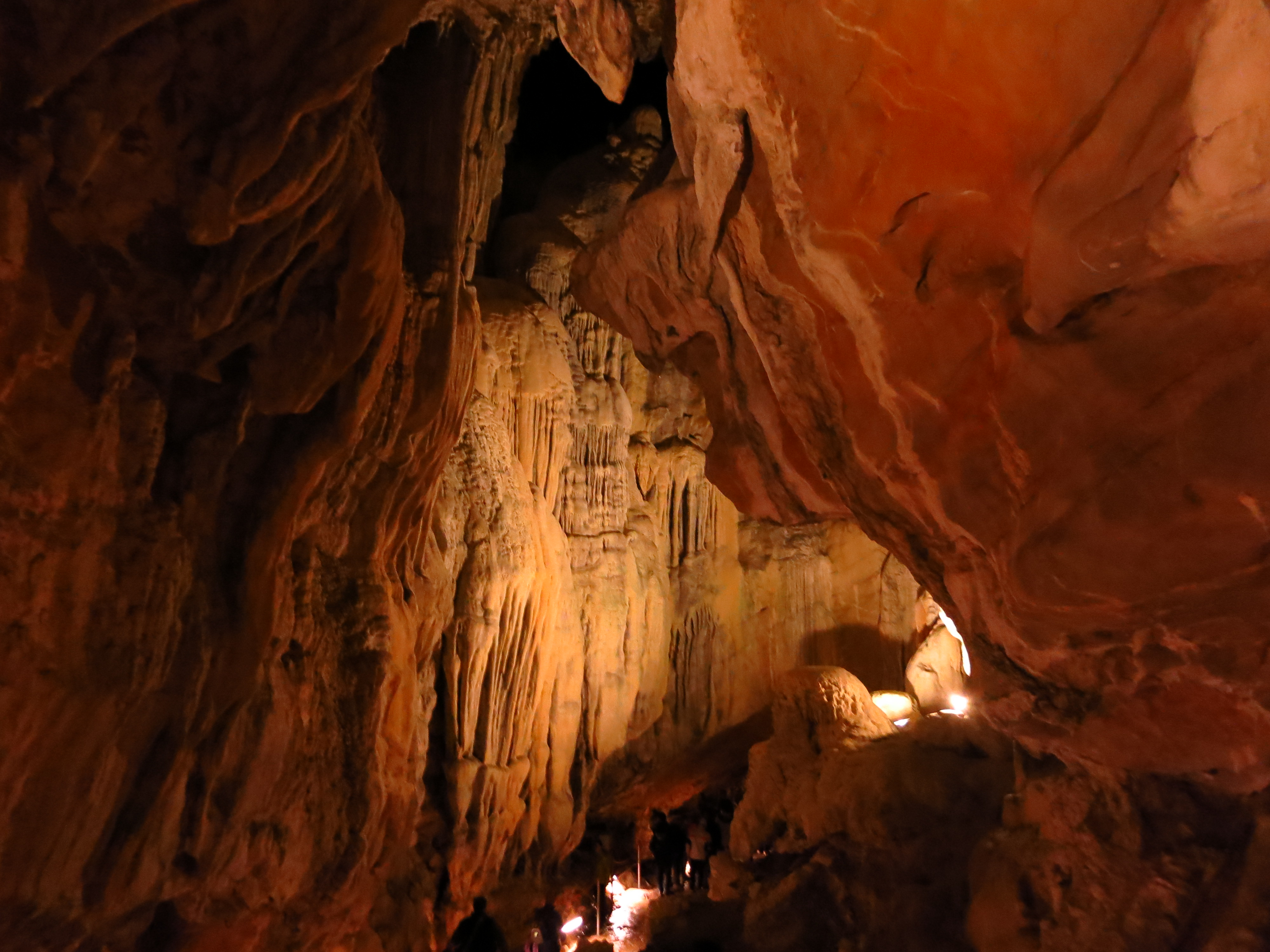 Cuevas de Villanúa This is a photography of a Site of Community Importance in Spain with the ID: ES2410022. Natura2000 entry, EEA entry